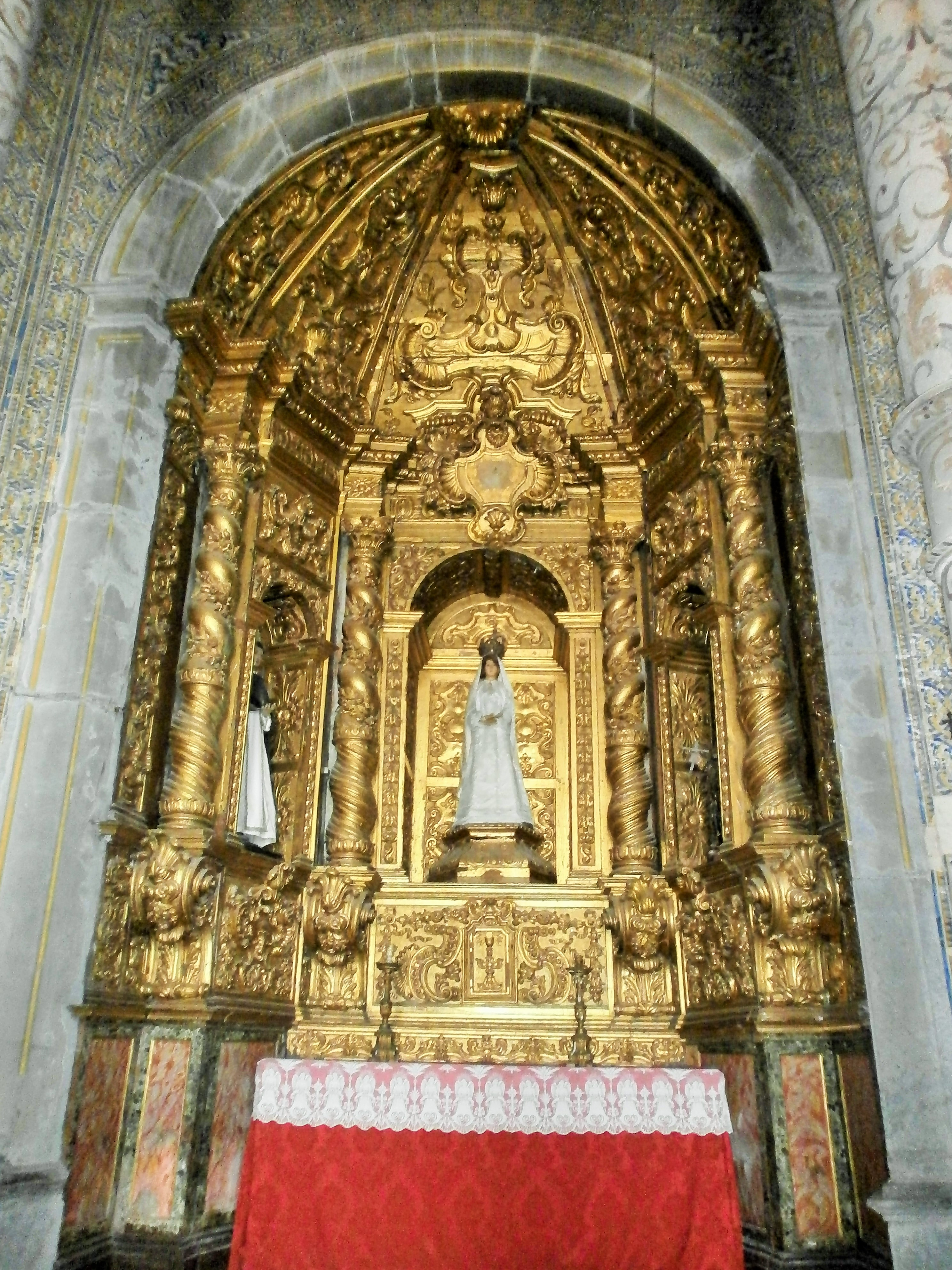 Iglesia de Nuestra Señora de la Asunción. Elvas, Portugal. Capilla lateral.